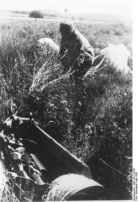 Nach der Landung auf Kreta. Im hohen Gras waren hier die Waffenbehälter niedergegangen. Jeder der Fallschirmjäger eilte zu seinem Waffenbehälter, um sich gefechtsbereit zu machen. PK-Aufnahme: Kriegsberichter Grunewald 5794-41 Mai 1941 "Fr" OKW